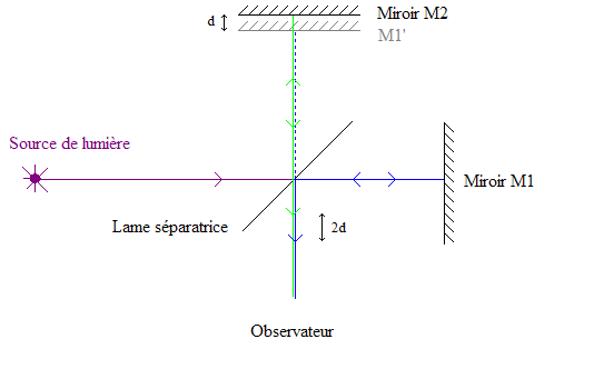 J'ai fait ce petit schéma pour illustrer l'article correspondant.